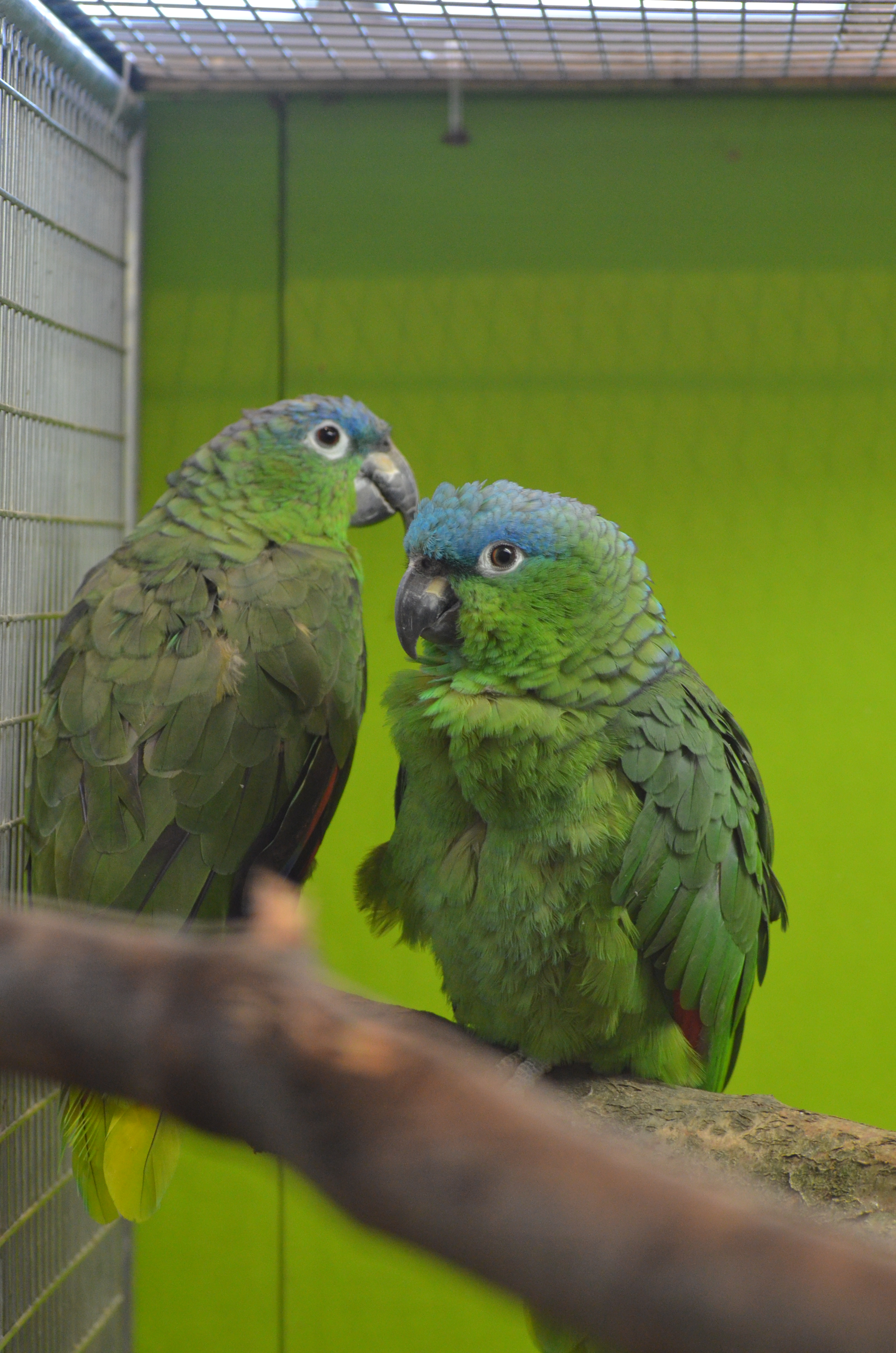 Guatemalaamazone Amazona farinosa guatemalae